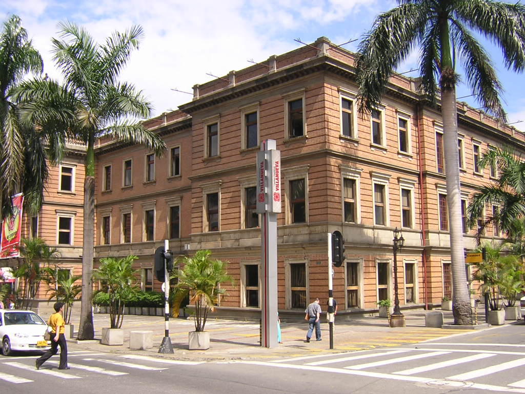 Centro Comercial Villanueva, Medellín, Colombia